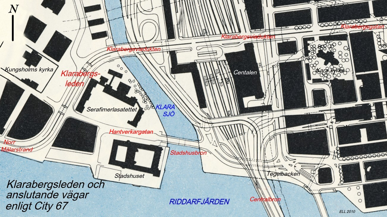 Klarabergsleden och anslutande vägar enligt City 67